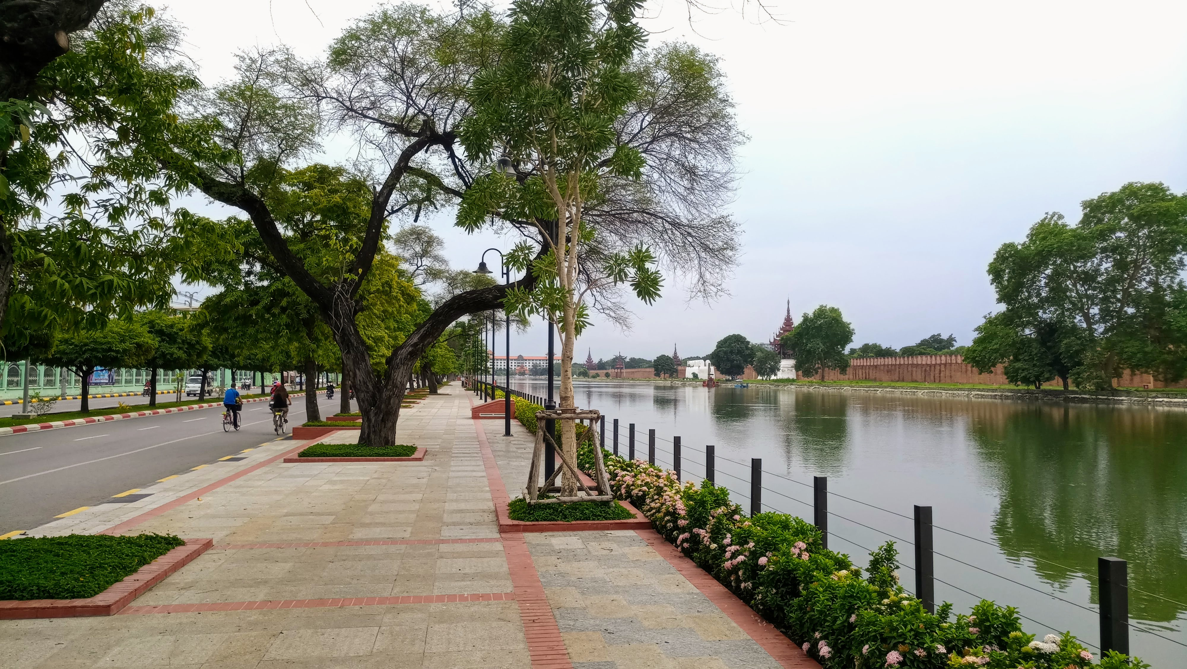 မြန်မာဘာသာ: မန္တလေးကျုံးအ‌ရှေ့ဖက်ခြမ်း လျှောက်လမ်း